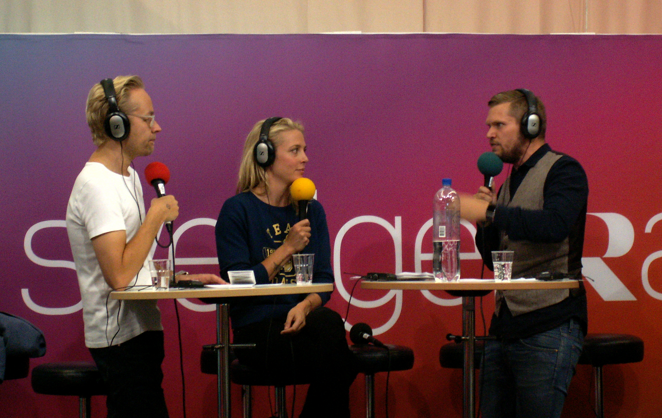 Fredrik Furtenbach, Annie Reuterskiöld och Henrik Torehammar under inspelning av podden Det politiska spelet.